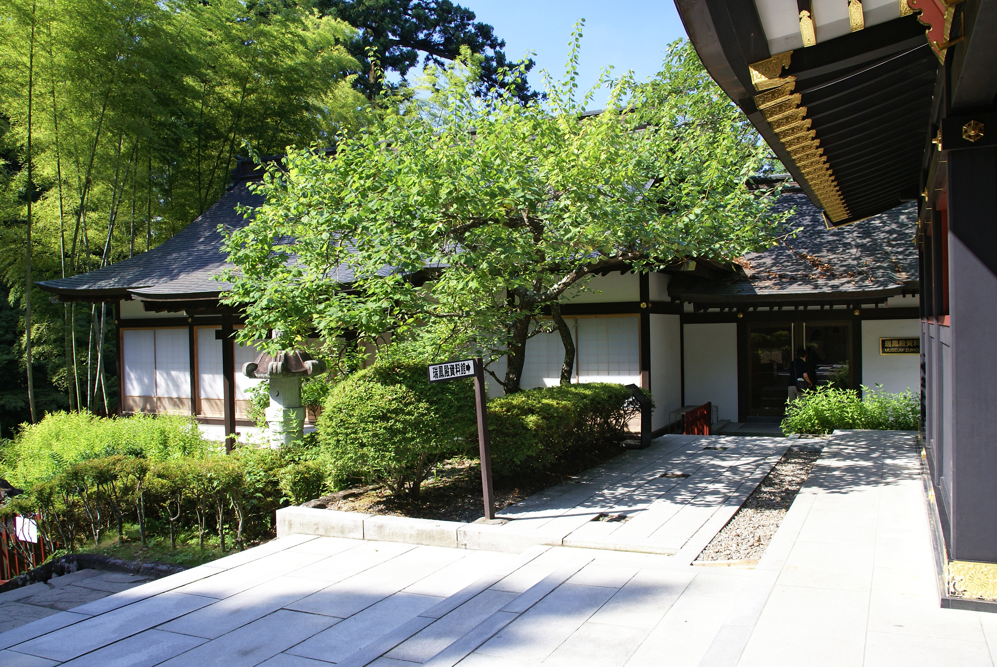 Zuiho-den in Sendai, Miyagi prefecture, Japan